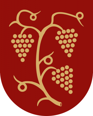 "Červený štít se zlatou vinnou ratolestí se třemi hrozny, přičemž dva z nich jsou na levé straně nad sebou, třetí pak v horní části strany pravé" Upravený znak města a vlajka města je z roku 1976 (autor textu Ivo Remunda, autor výtvarného návrhu Ivan Remunda)